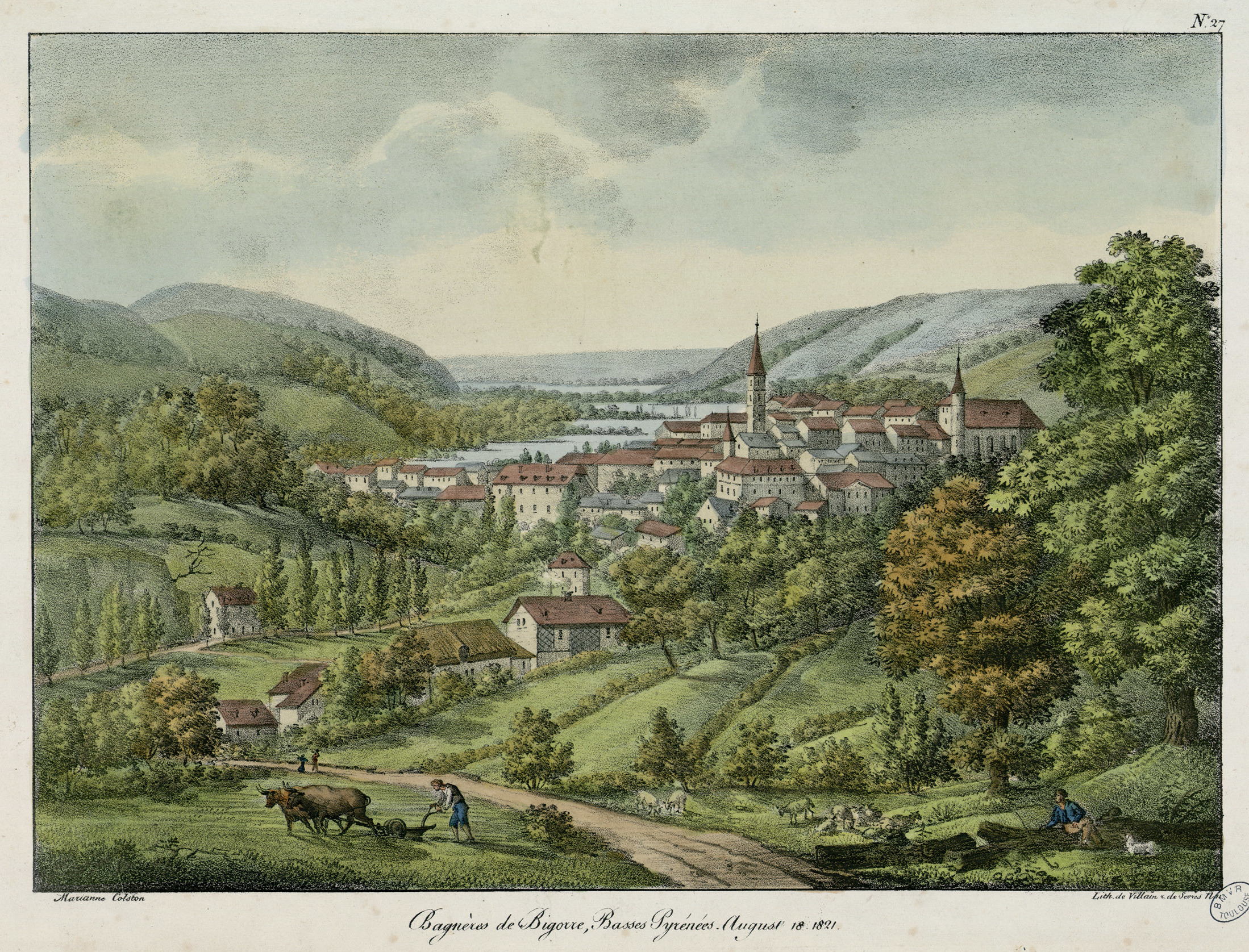 27 planches pyrénéennes extraites de "Journal of a tour in France, Switzerland, and Italy, during the years 1819, 1820, 1821", qui comprend 2 volumes in-8° et 1 album in-f° de 50 planches lithographiées. La partie pyrénéenne de l'ouvrage est contenue dans les chapitres XX, XXI et XXII du Tome II (p. 155-231) et les planches n°24 à 50 de l'album (toutes datées de 1821). La 49e lithographie (Arreau taken from the Road to Saracolin, October 1821) n'est pas chiffrée. Toutes les lithographies sont ici aquarellées Ancely, René (1876 - 1966). Possesseur